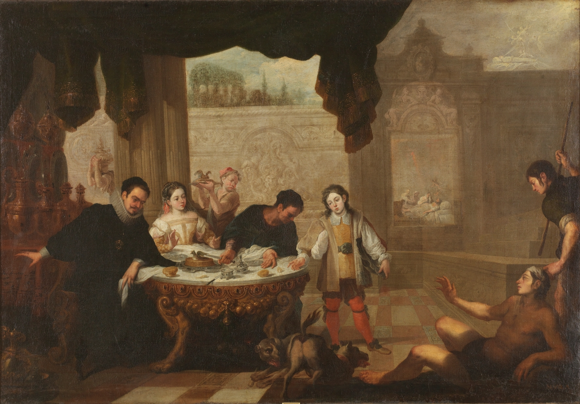 La obra representa la Parábola del rico Epulón y el pobre Lázaro, que fue narrada por Jesucristo y está consignada en los Santos Evangelios.